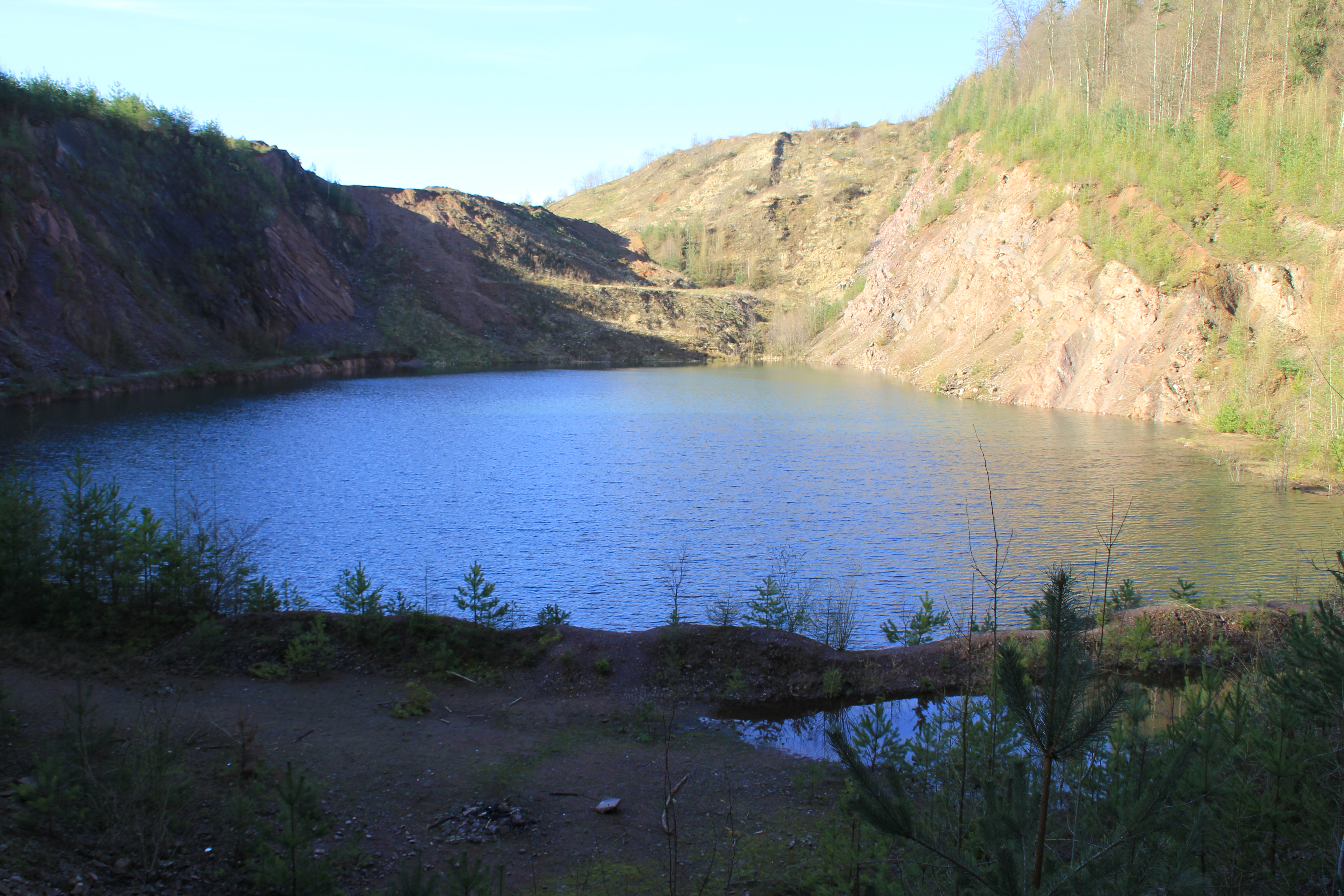 Der Hahnenkammsee im Spessart bei Mömbris, Bayern